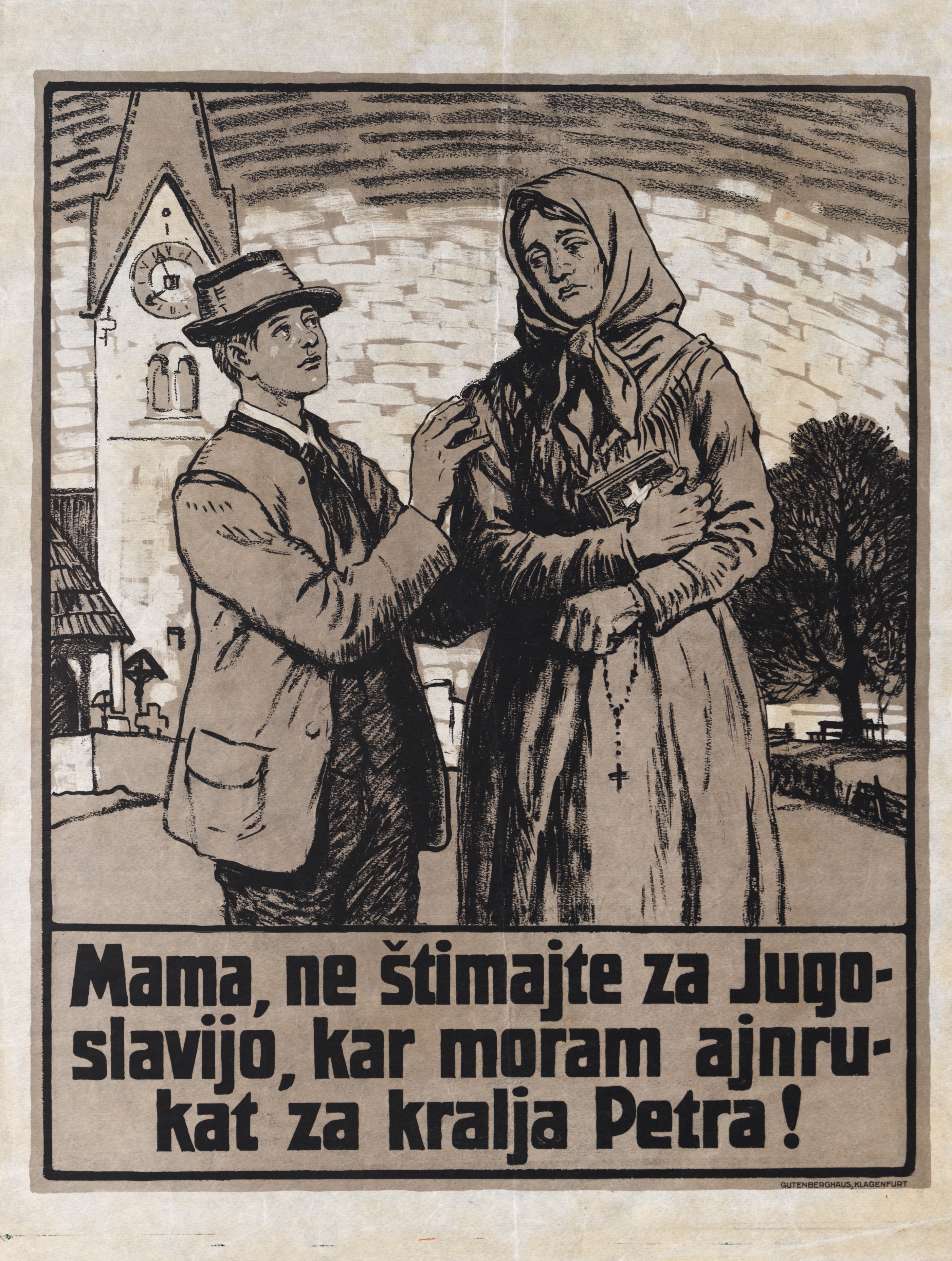 Avstrijski propagandni plakat ob plebiscitu. »Mama, ne štimajte [glasujte] za Jugoslavijo, kar moram ajnrukat [v vojsko] za kralja Petra!« Nemška stran je poskušala s takimi sporočili ustvariti prepričanje, da sta vojaštvo in krvoločnost značilnost jugoslovanstva/slovenstva (v tem primeru zaradi splošne vojaške obveznosti), avstrijstvo/nemštvo pa je bilo prikazano kot miroljubno.